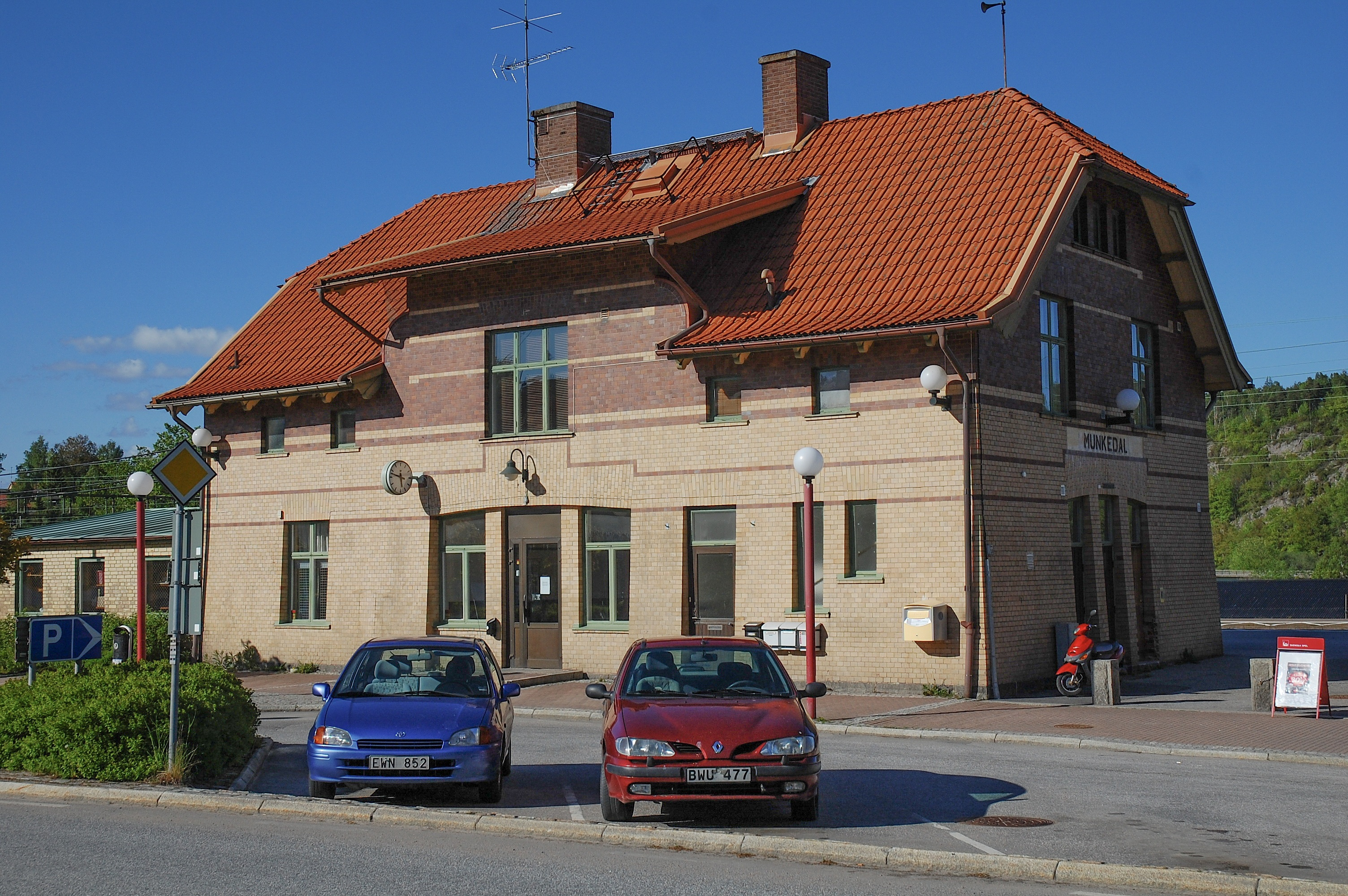 Munkedals järnvägsstation